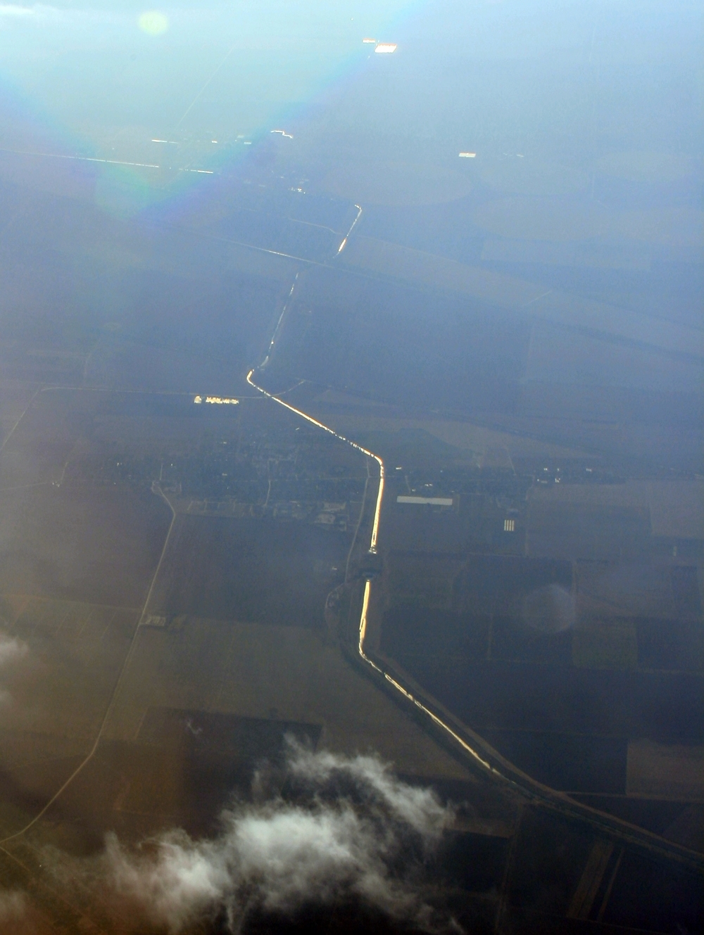 Северокрымский канал севернее Симферополя